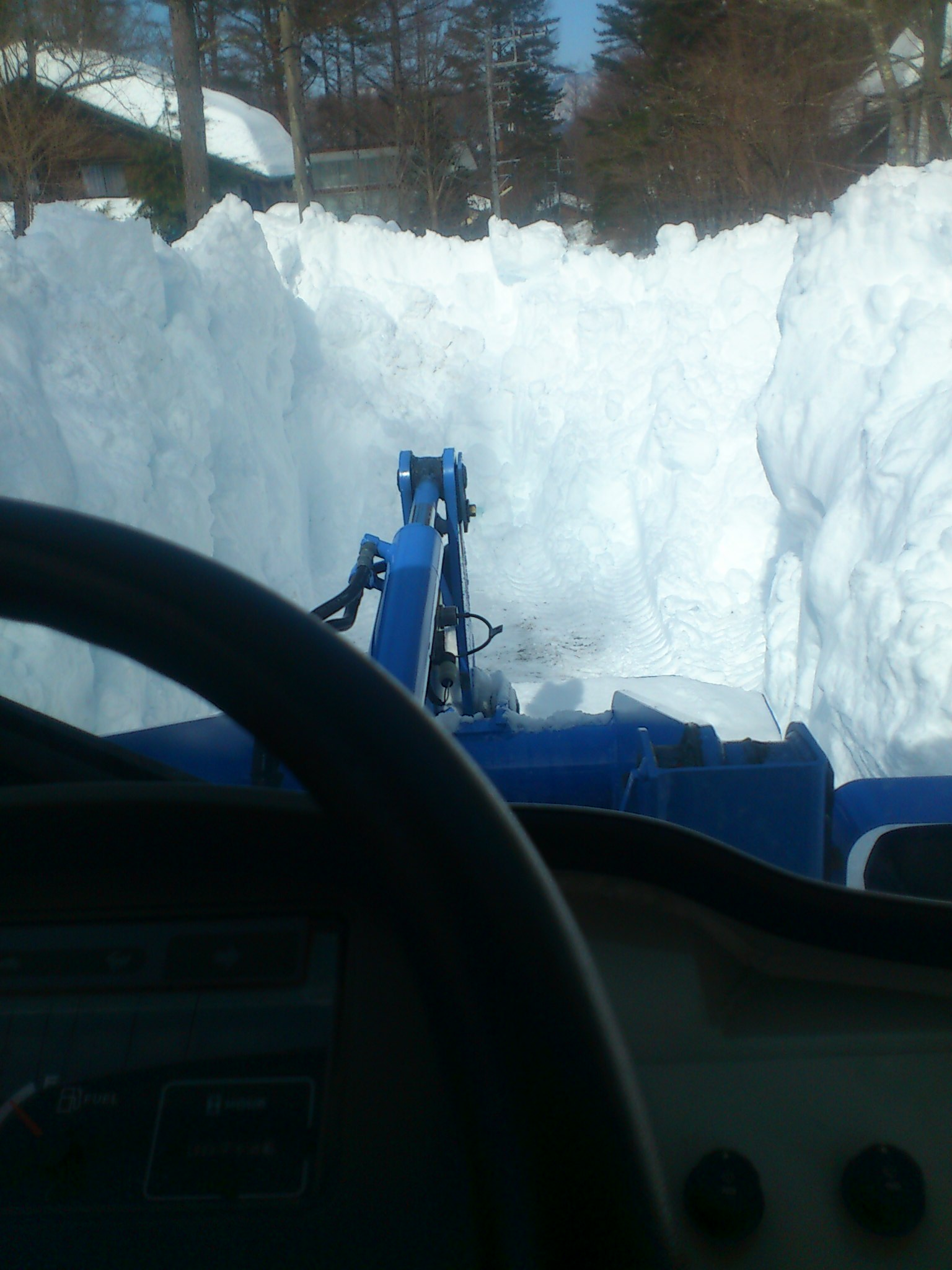 平成２６年豪雪 山梨県鳴沢村 除雪中の道路